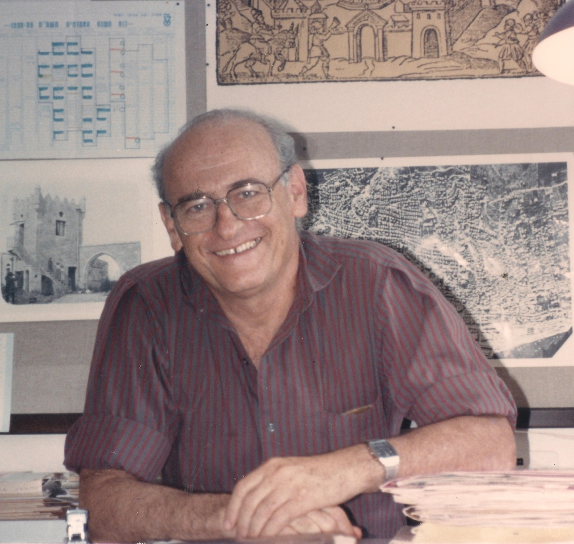 אברהם וכמן